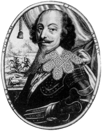 Henri II. de Rohan (1579-1638) Clipped version of Henri Duc de Rohan.jpg.